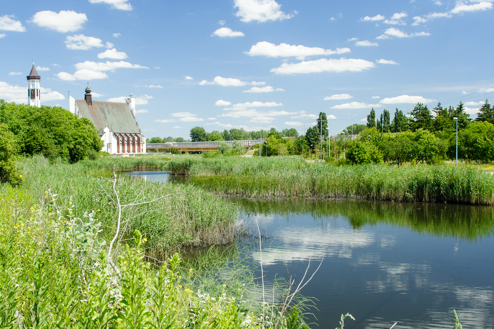 Łacha Siekierkowska cz. zach.-pn., Sanktuarium Matki Bożej Nauczycielki Młodzieży w Warszawie, z prawej strony w głębi Trasa Siekierkowska.